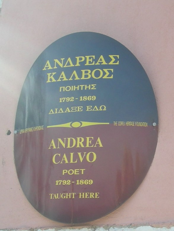 Πλάκα του Ανδρέα Κάλβο στην Ιόνιο Ακαδημία.